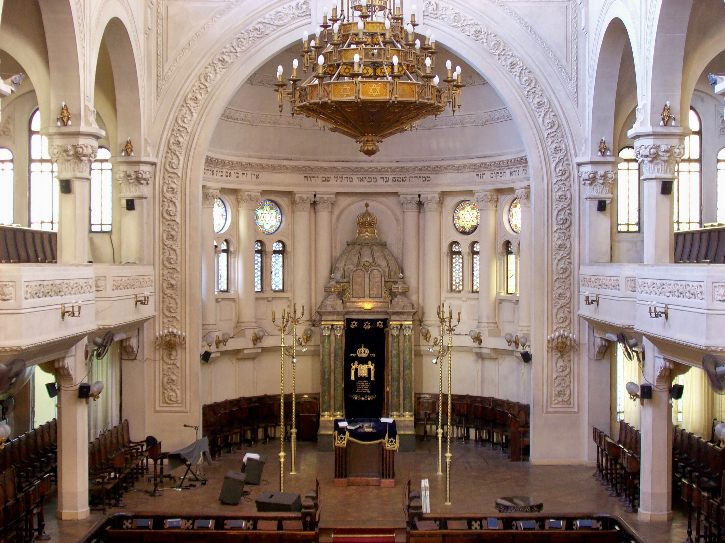 Interior de la sinagoga Gran Templo Paso en el barrio de Balvanera, Ciudad de Buenos Aires, Argentina.